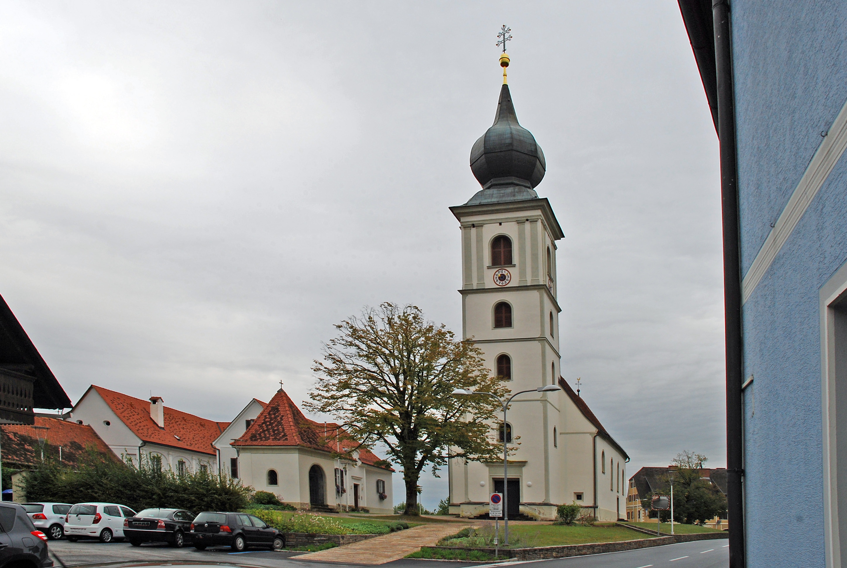 Raum um die Pfarrkirche Sankt Stefan ob Stainz, Steiermark, Österreich Object location46° 55′ 46.37″ N, 15° 15′ 19.52″ E